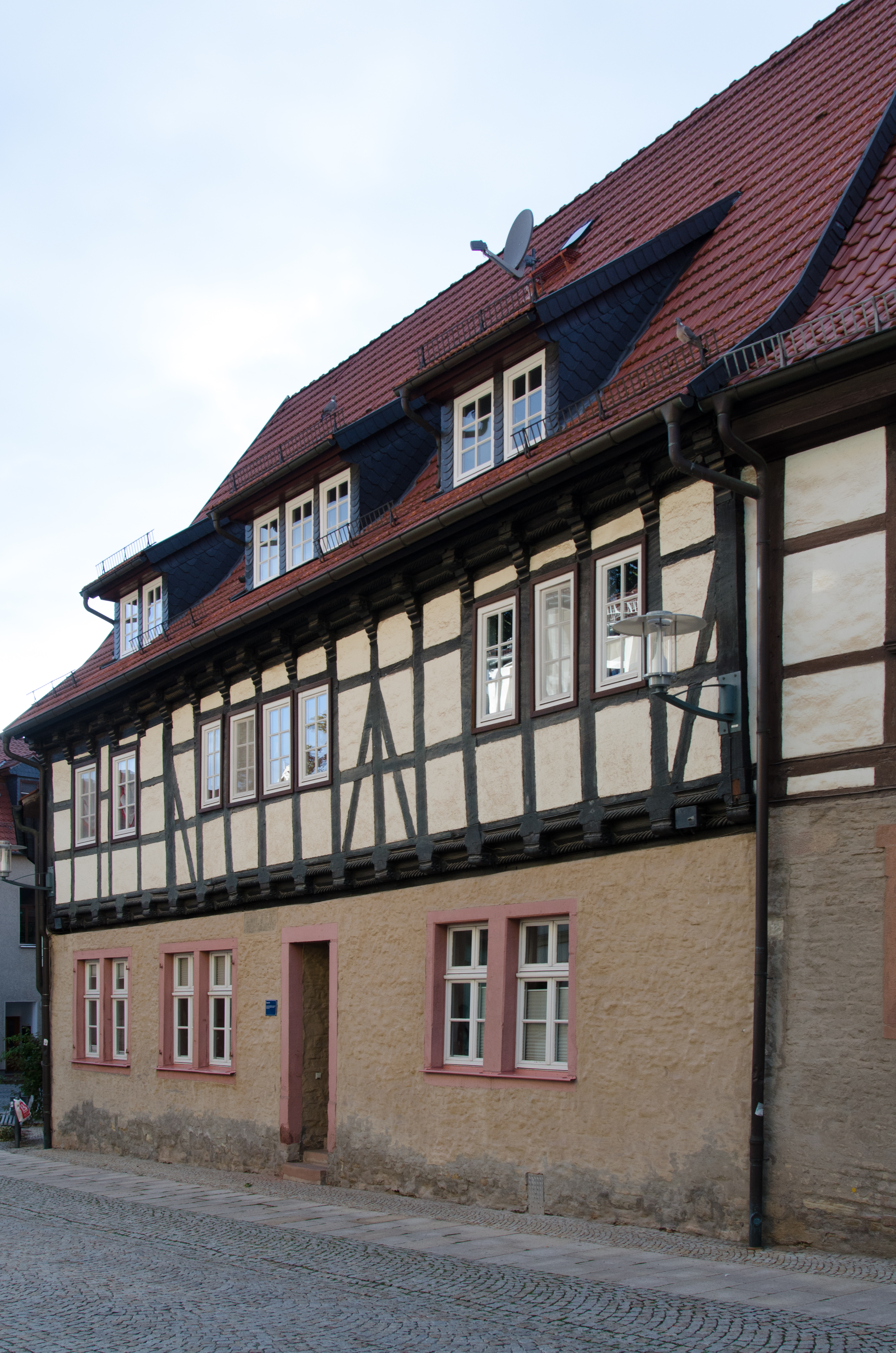 Sangerhausen, Markt 24